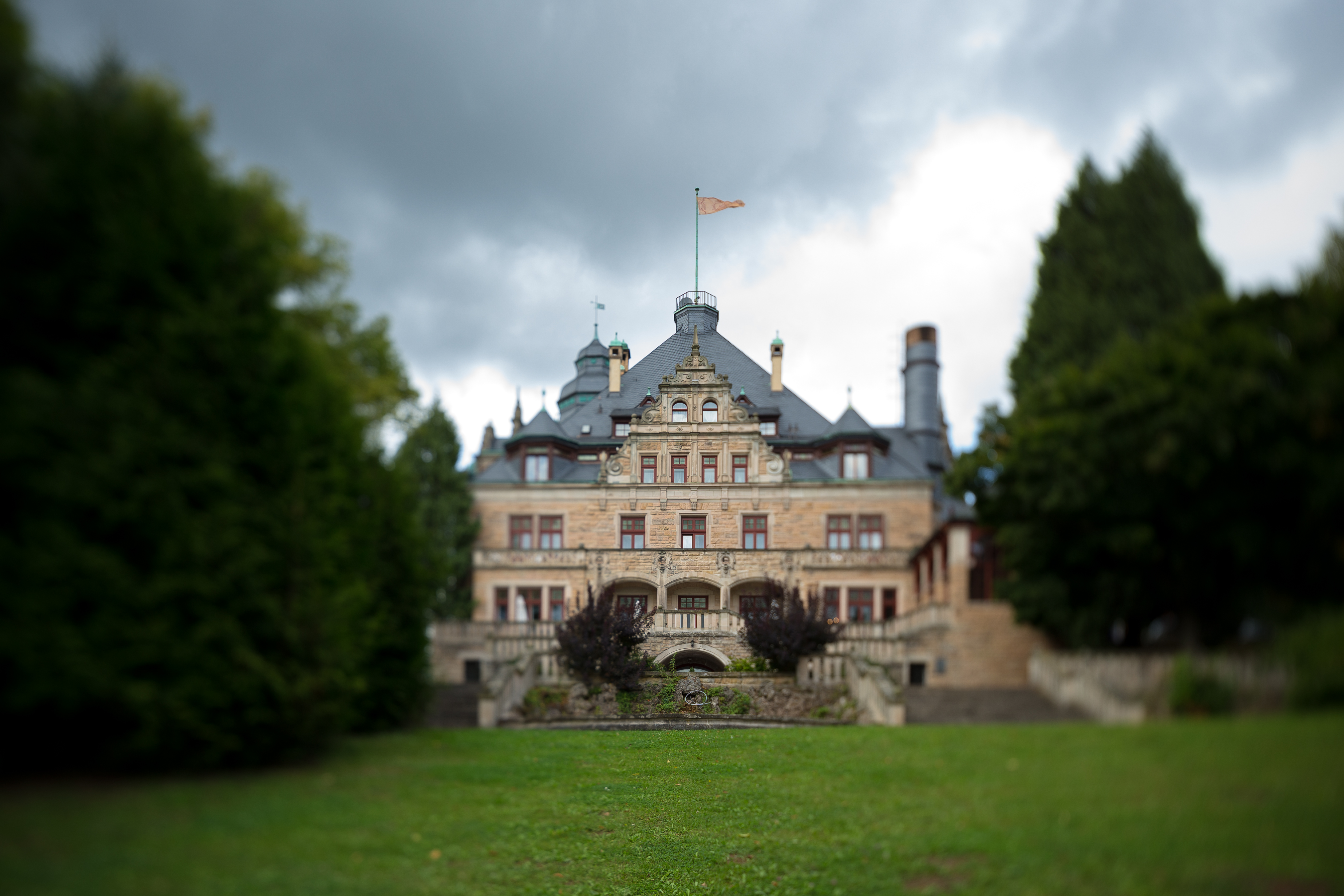 Tilt-Shift-Aufnahme der Südostfassade von Schloss Wolfsbrunnen.